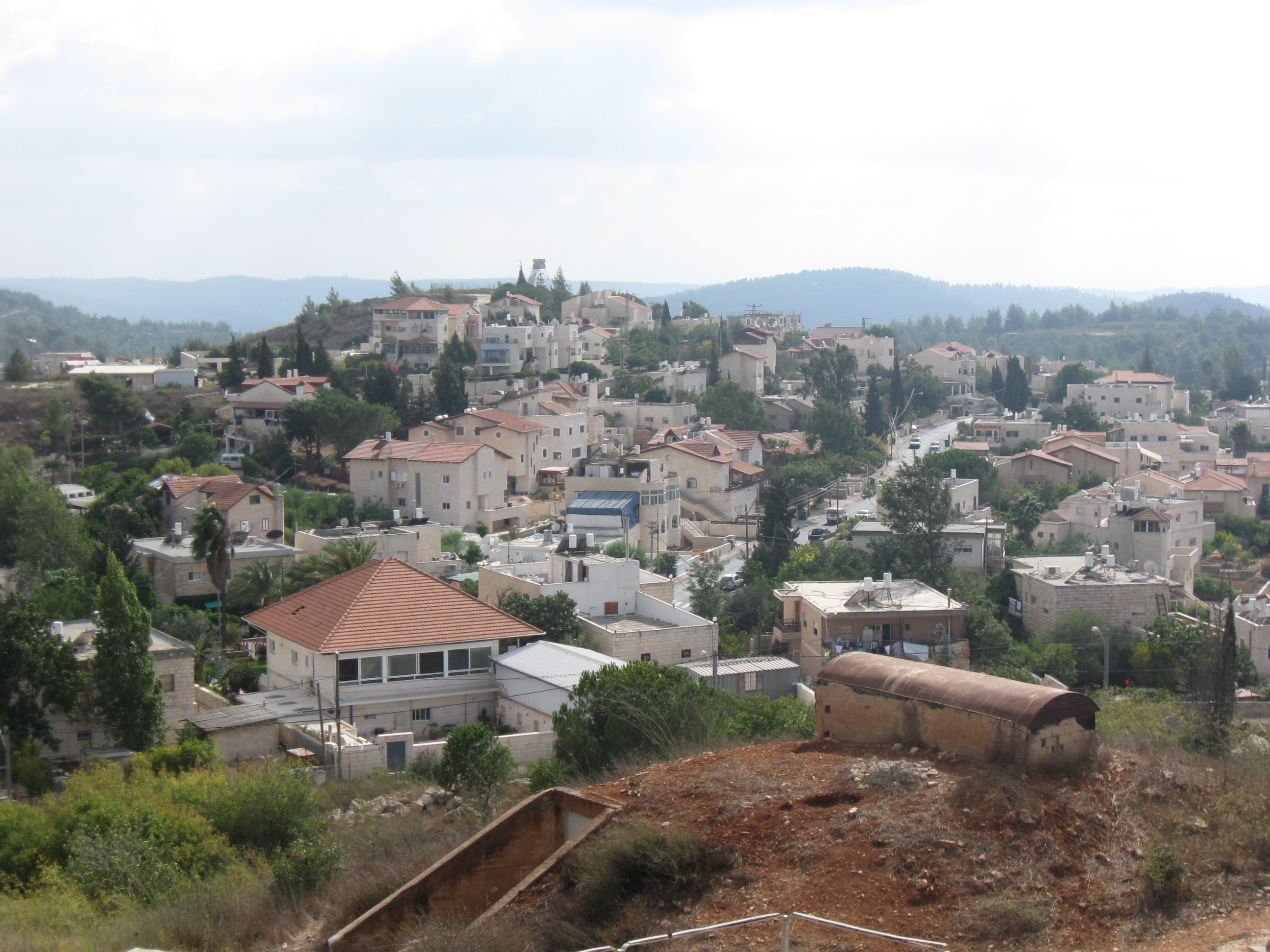 מראה מהקסטל